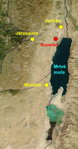 Lokace Kumránu